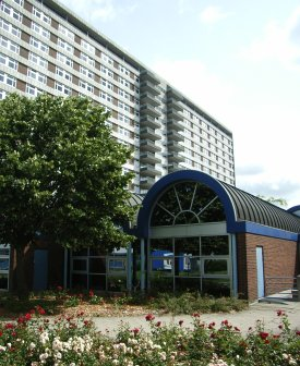 Billede af Videncentret Odense Universitetshospital